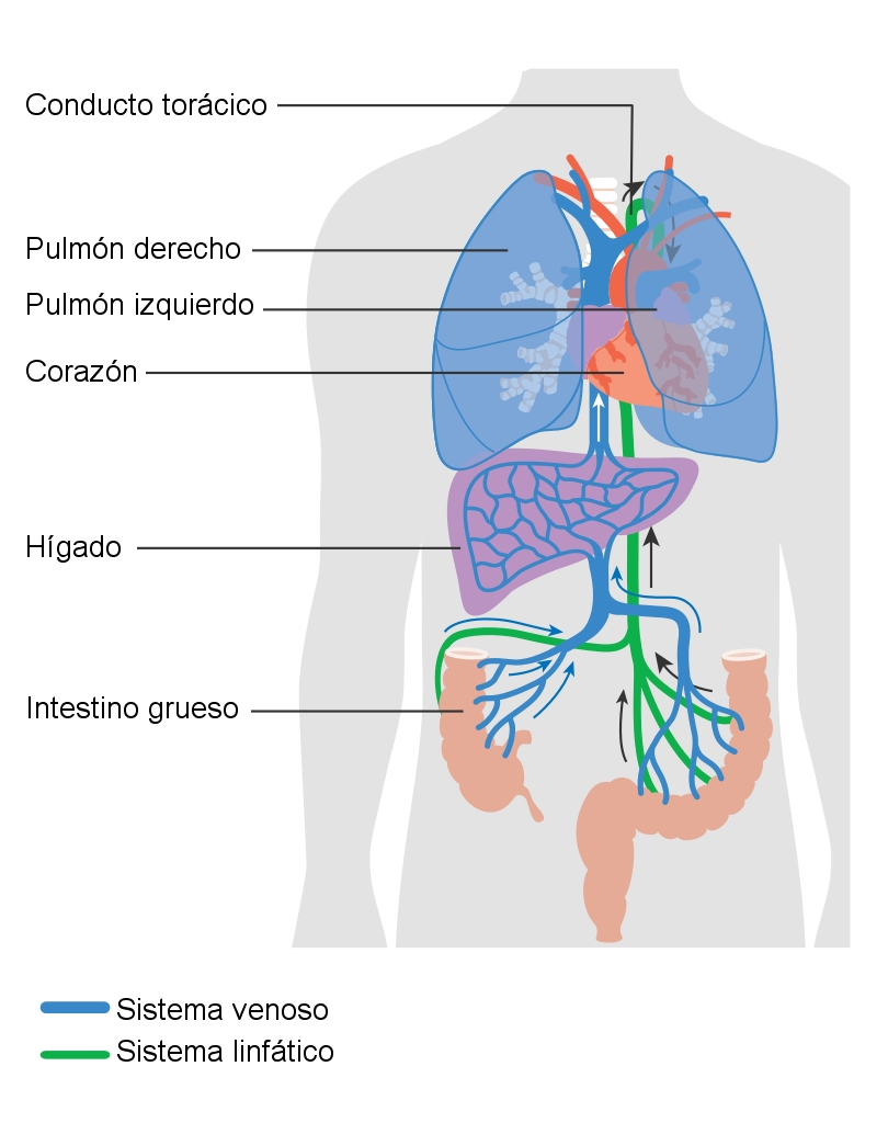 Esquema en el que se muestra la circulación linfática. Puede observarse como la linfa procedente del intestino desemboca en el conducto torácico.